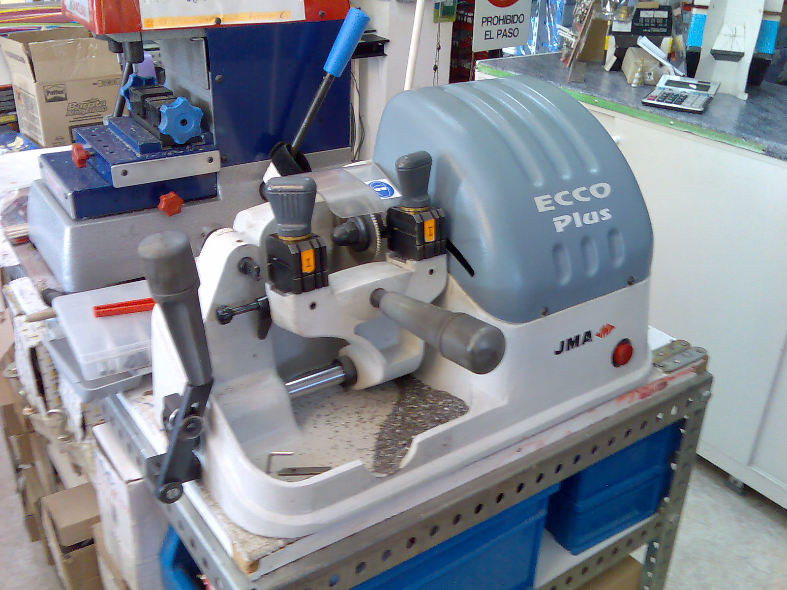 Máquina copiadora de llaves. Key cutting machine. JMA Ecco Plus.